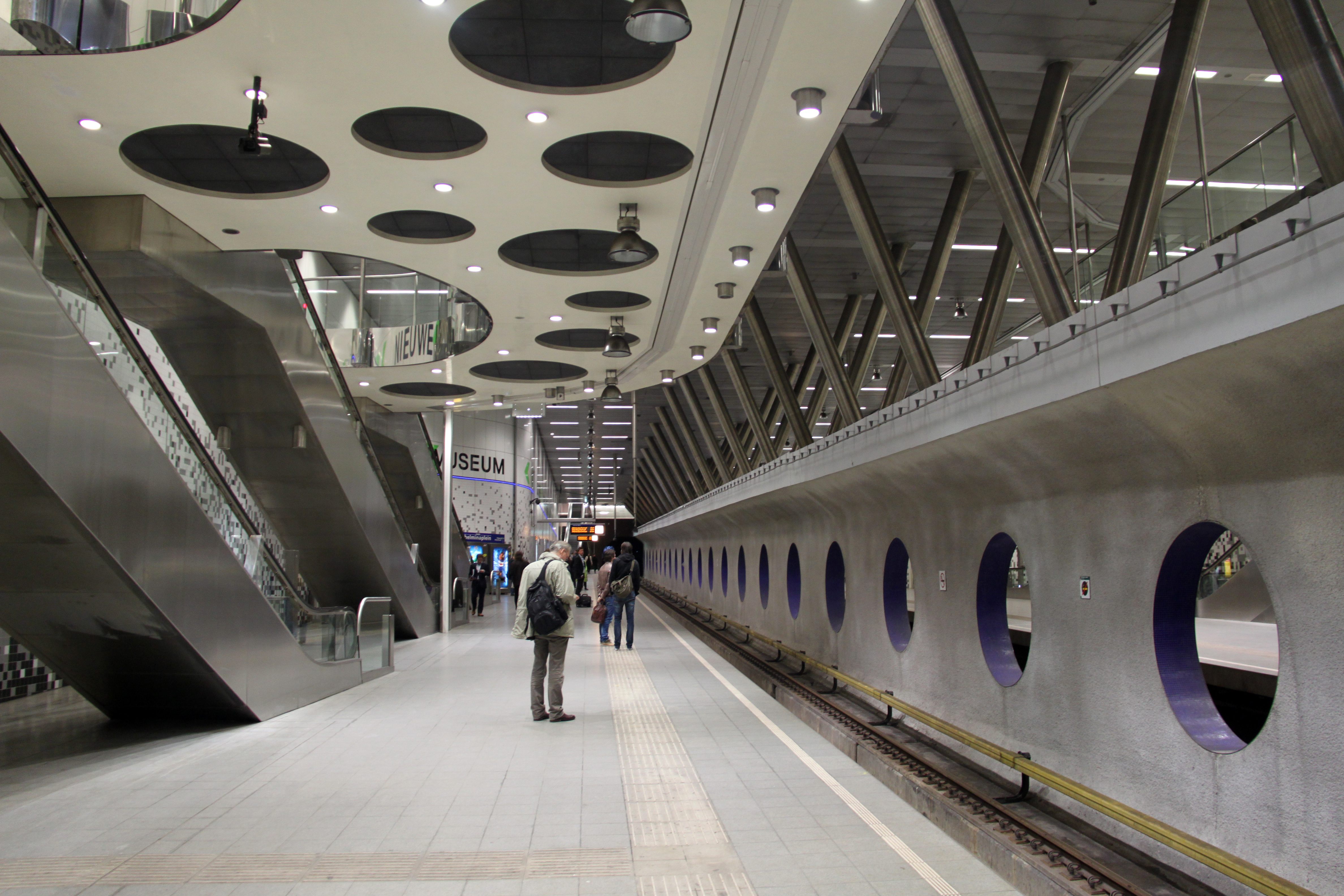 Perron richting Rotterdam Centraal, gezien richting Spijkenisse.